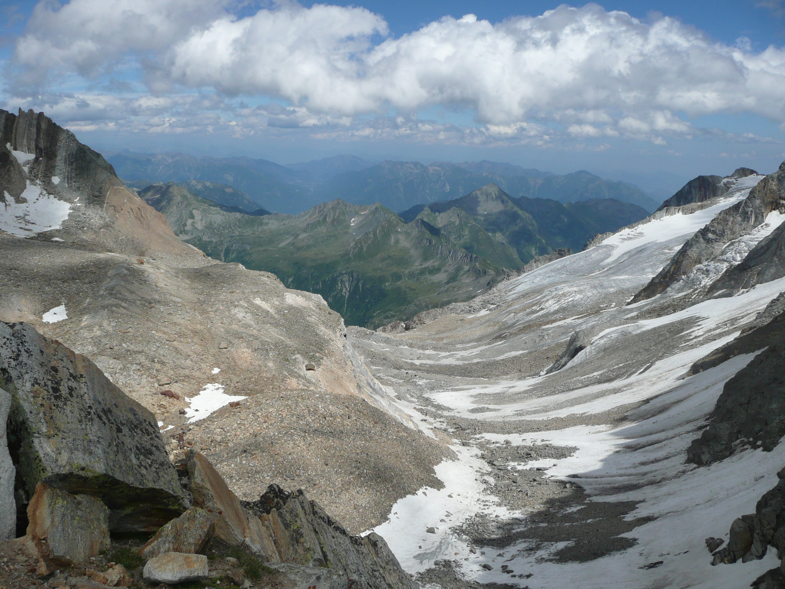 Blick vom Zwischbergenpass ins Zwischbergental.